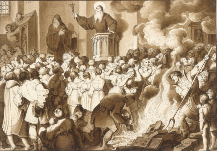 Predigt des heiligen Johannes Capistranus bei St. Stephan (1451) Feder- und Pinselzeichnung in Braun mit Weißhöhungen über Bleistift von Karl Ruß. Blatt 122 aus dem Zyklus „Bilder zur Geschichte von Wien“. Die 149 Zeichnungen entstanden zwischen 27. Jänner 1826 und 12. Dezember 1832.